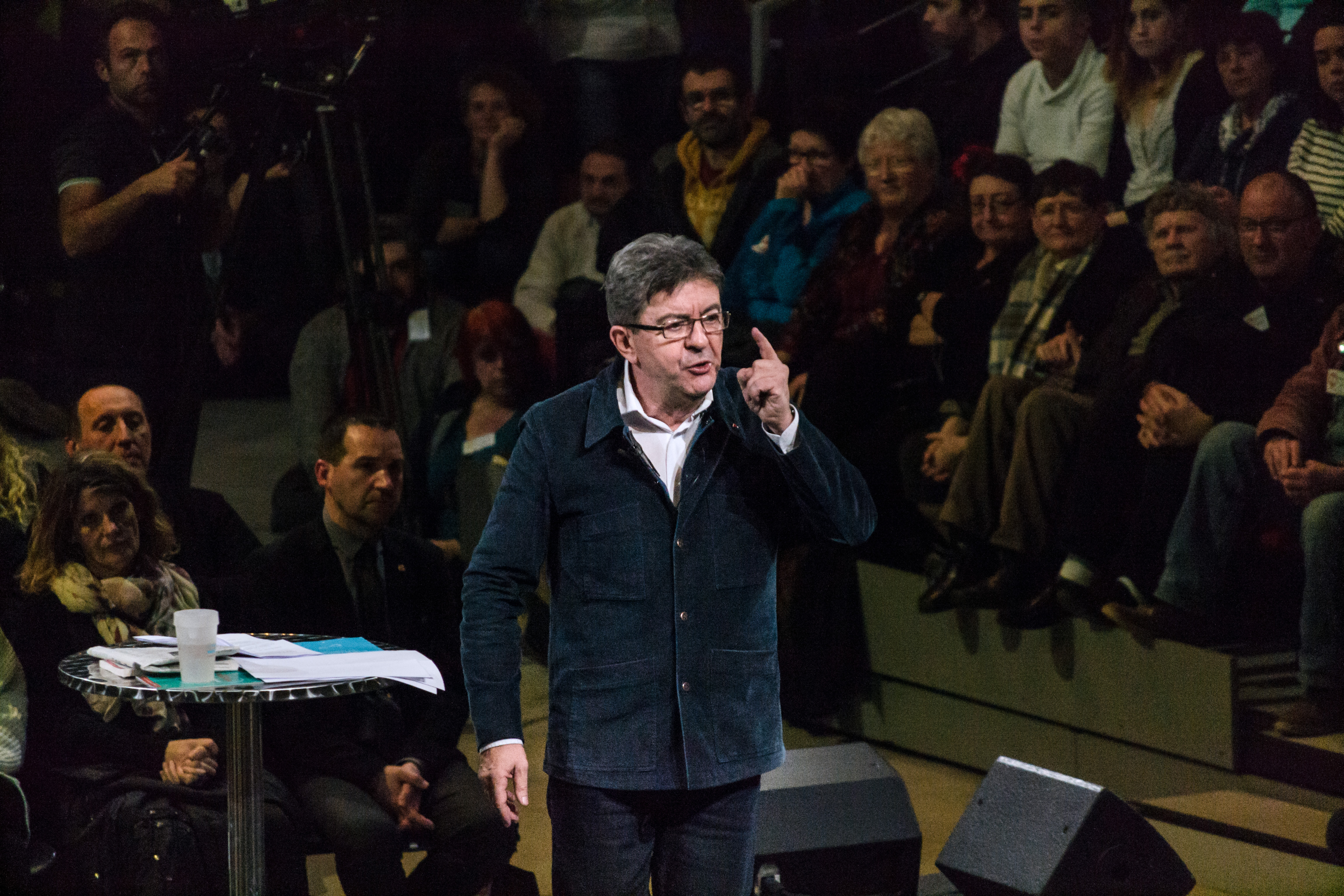 Réunion publique de Jean-Luc Mélenchon à Brest (Brest Arena) devant 4000 personnes le 28 février 2017 dans le cadre de l'élection présidentielle.